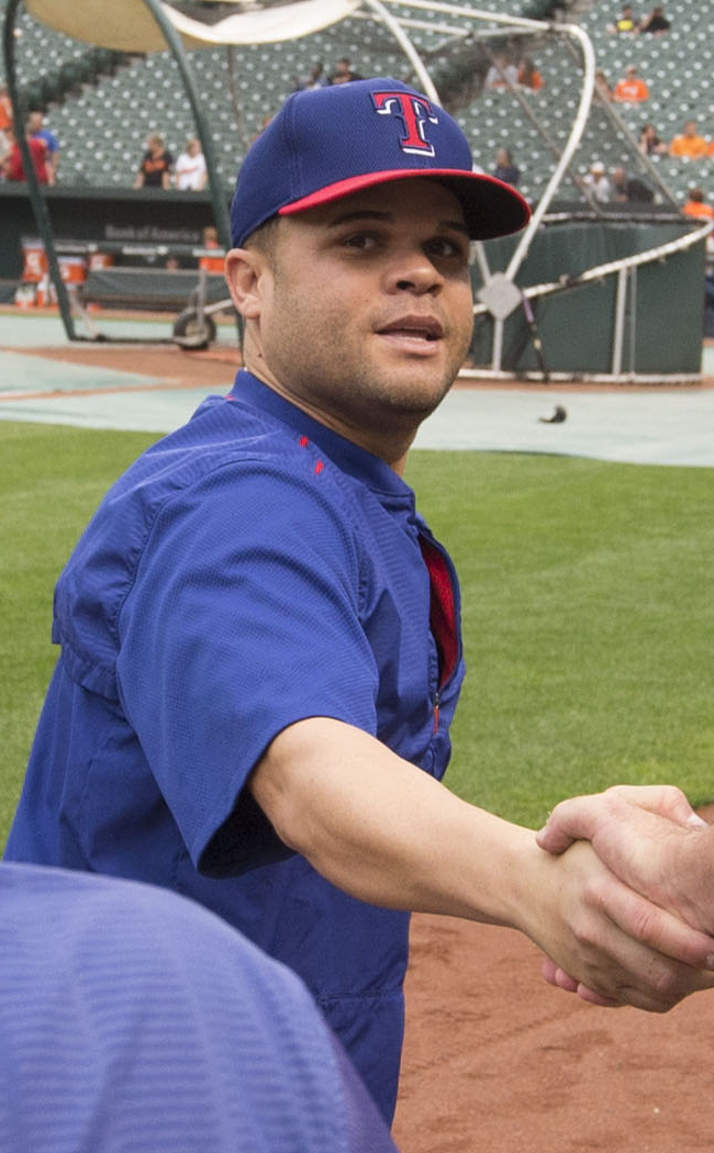 Wandy Rodríguez